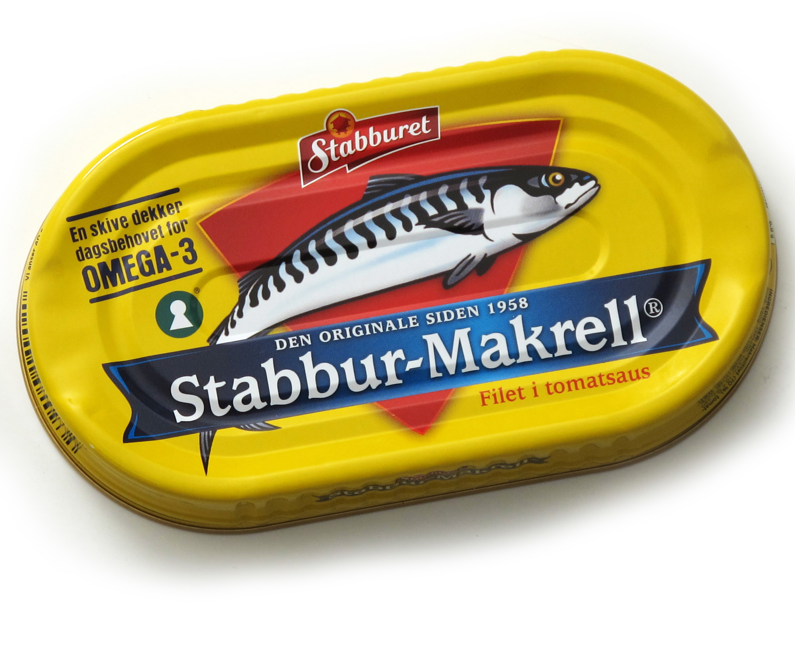 Boks med makrell i tomat